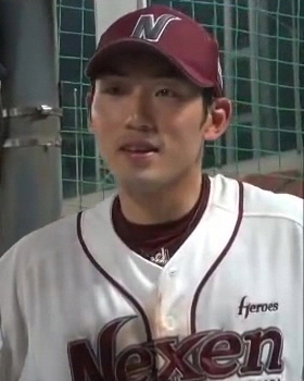 나이트,서건창수훈선수 5월29일(화)넥센vs SK전 수훈선수